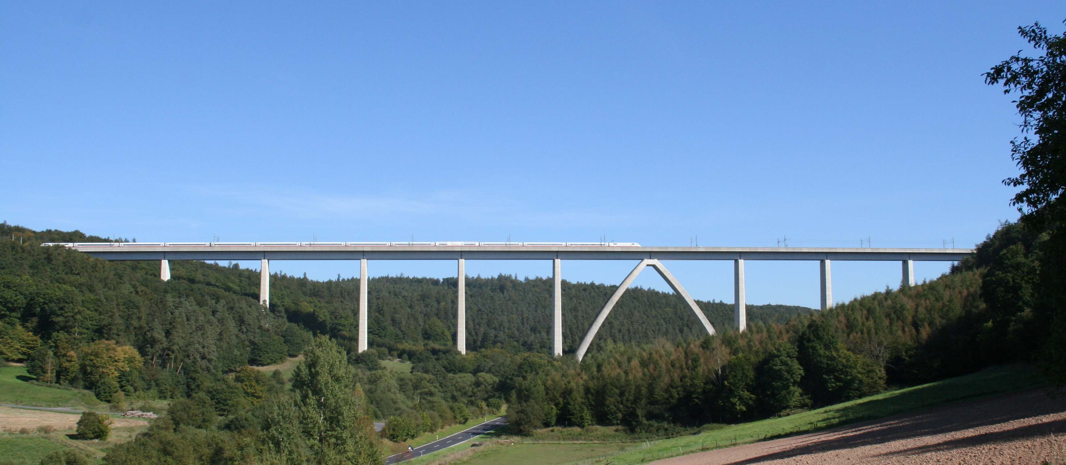 Rombachtalbrücke bei Schlitz